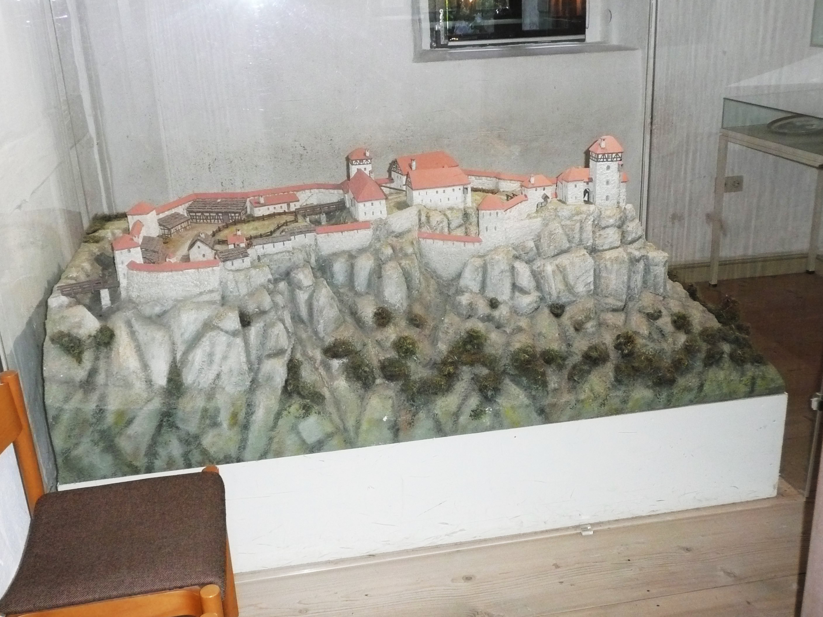 Modell der ehemaligen Burg Neideck im Fränkischen Schweiz Museum Tüchersfeld